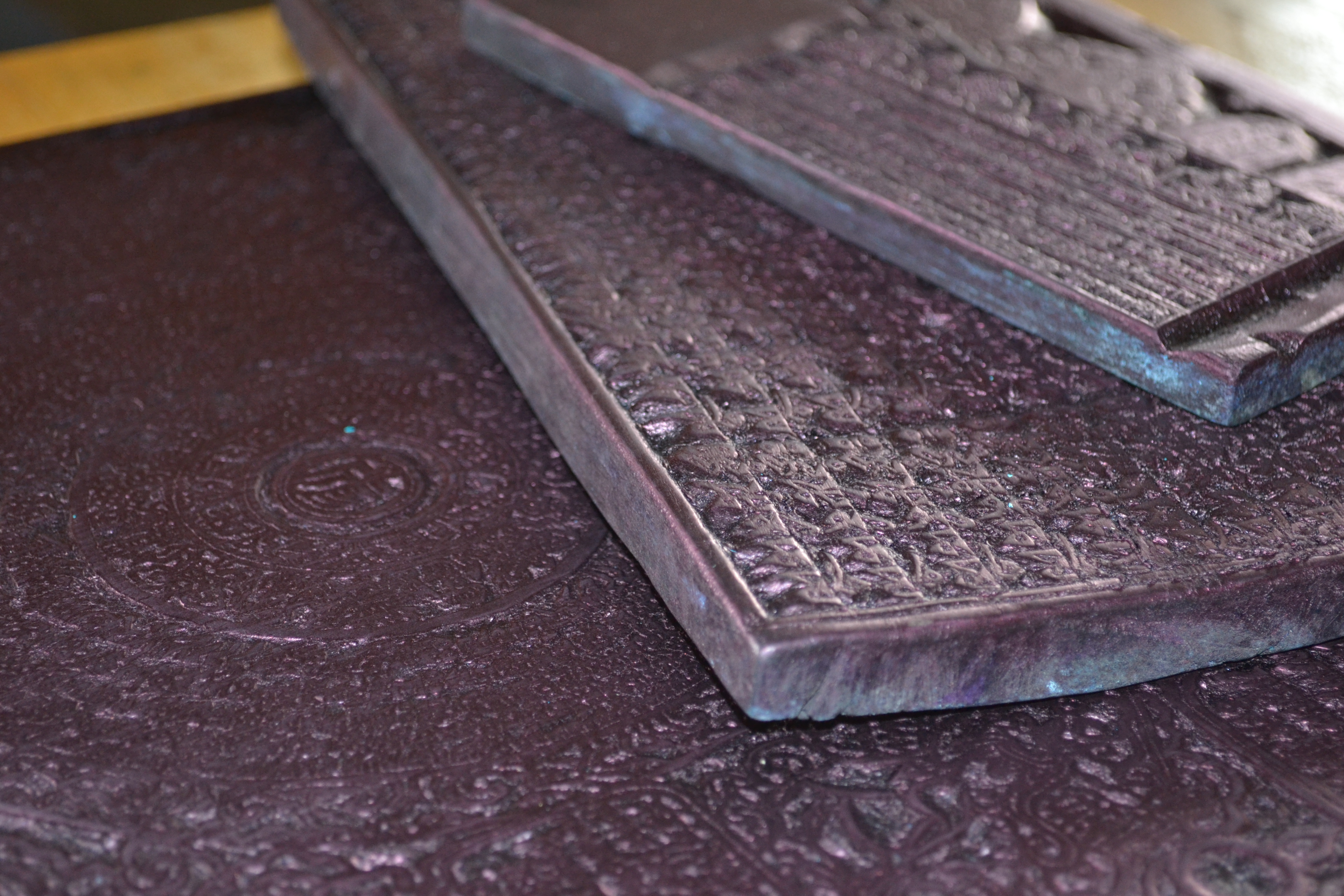 Сартул-Гэгэтуйский дацан, село Гэгэтуй, Джидинский район, Республика Бурятия